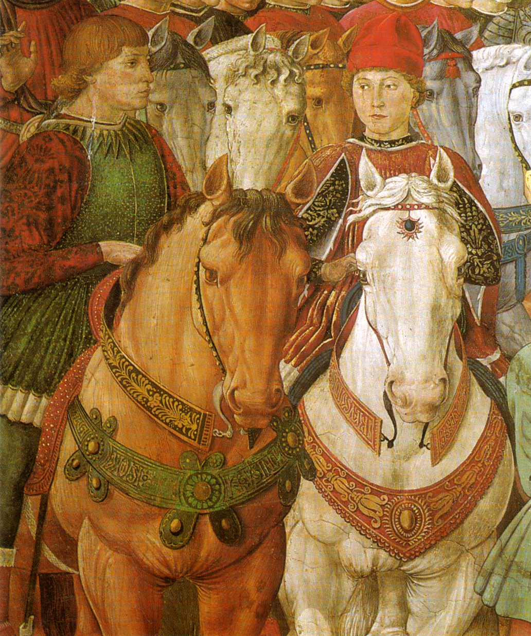 Sigismondo Malatesta (left) and Galeazzo Maria Sforza (right). Detail from the fresco by Benozzo Gozzoli, in the "Cappella dei Magi", at Palazzo Medici Riccardi in Florence, Italy.